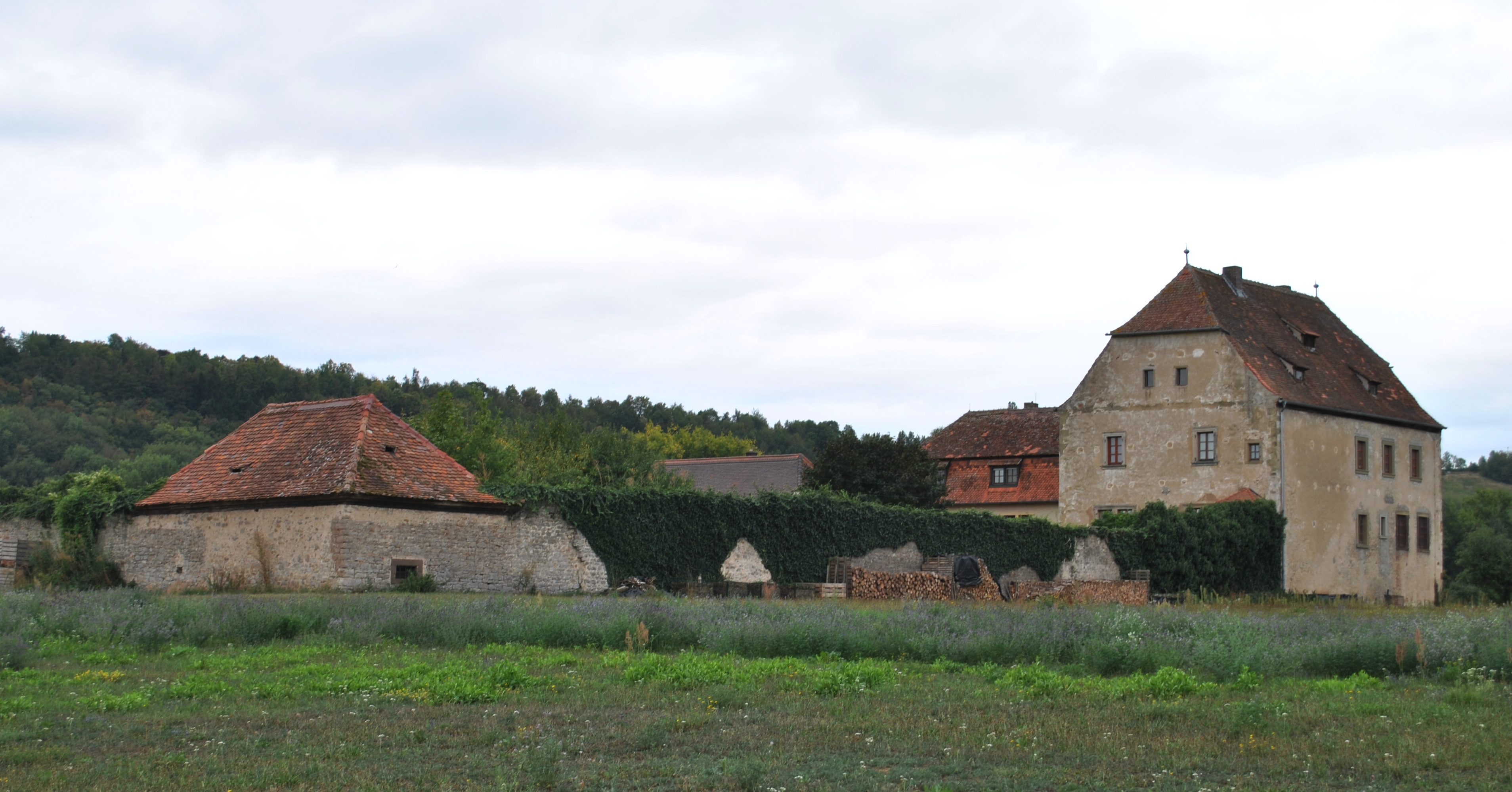 Ehemaliges Königsgut der Reichsministerialen von Stollberg, später Klosterhof der Zinsterzienserabtei Ebrach, nach 1803 Altersheim für verarmte Volkacher Bürger Wohnhaus, zweigeschossiger Halbwalmdachbau, verputztes Natursteinmauerwerk, geohrte Sandsteinfenstergewände, bezeichnet „1712“, über älterem Kern Scheune, Bruchsteinbau mit Halbwalmdach, Nebengebäude und Klostermauer 17./18. JahrhundertThis is a photograph of an architectural monument.